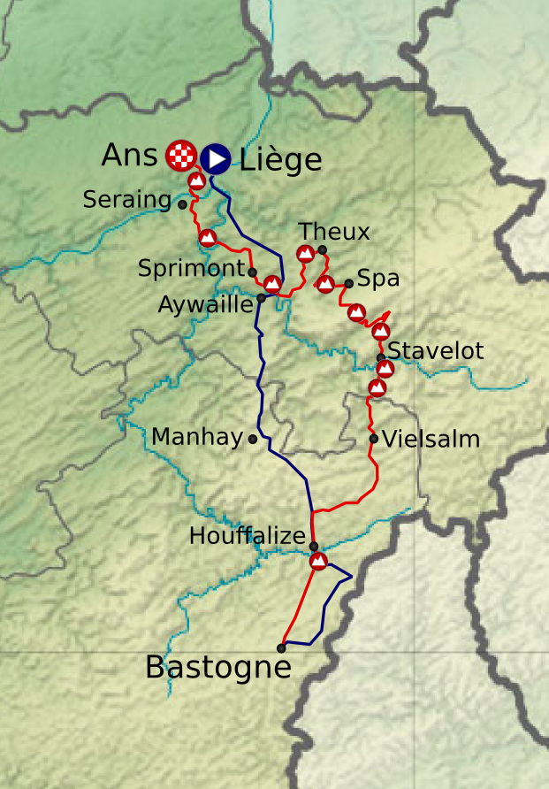 Carte du parcours de Liège-Bastogne-Liège 2011 (Belgique)